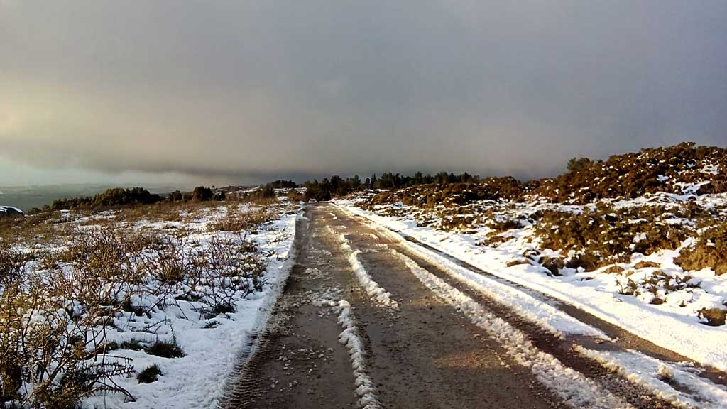 Cumio do Monte do Gato nevado.